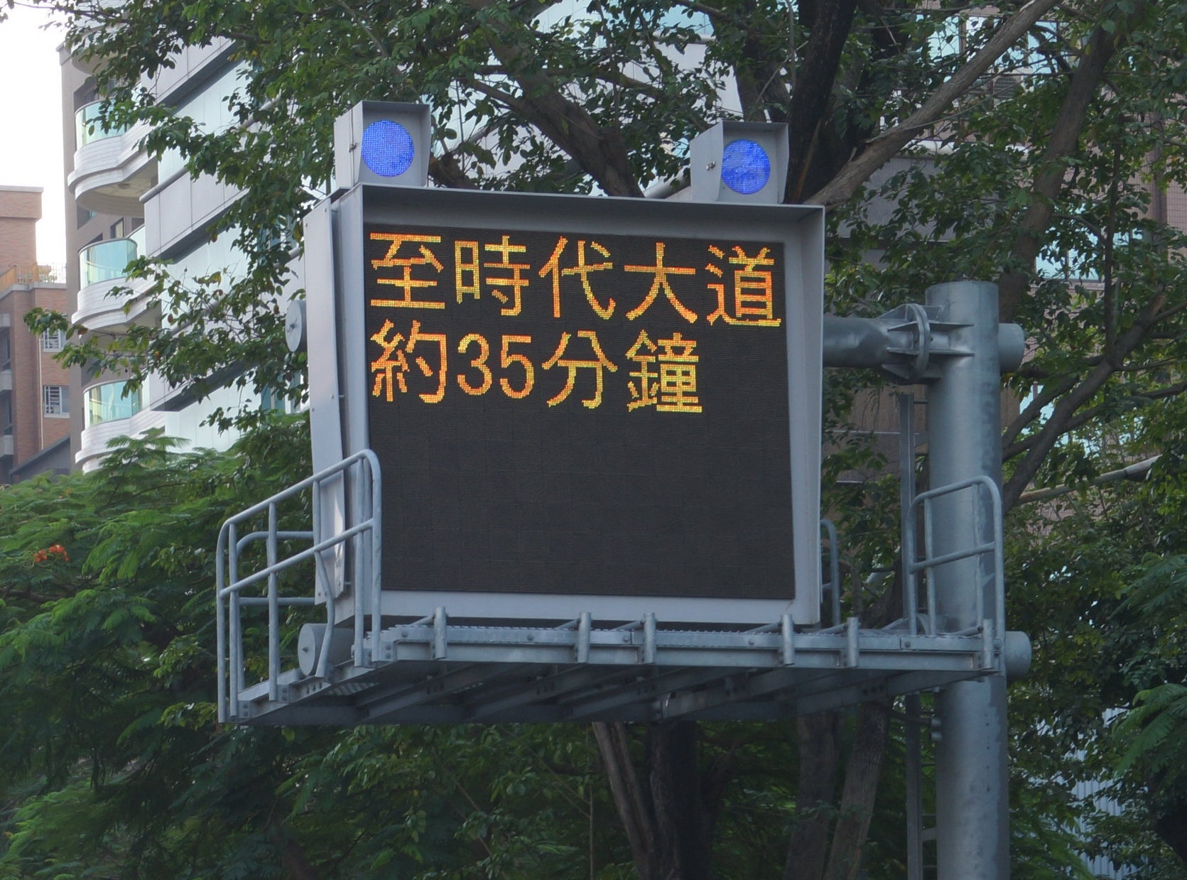 資訊可變標誌